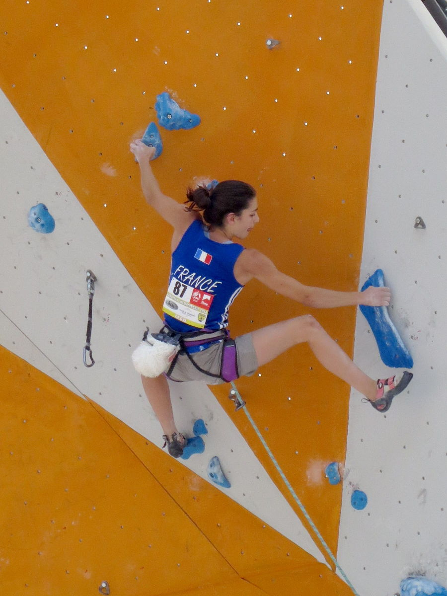 Hélène Janicot en demi-finale du championnat d'Europe d'escalade (difficulté) 2013 à Chamonix